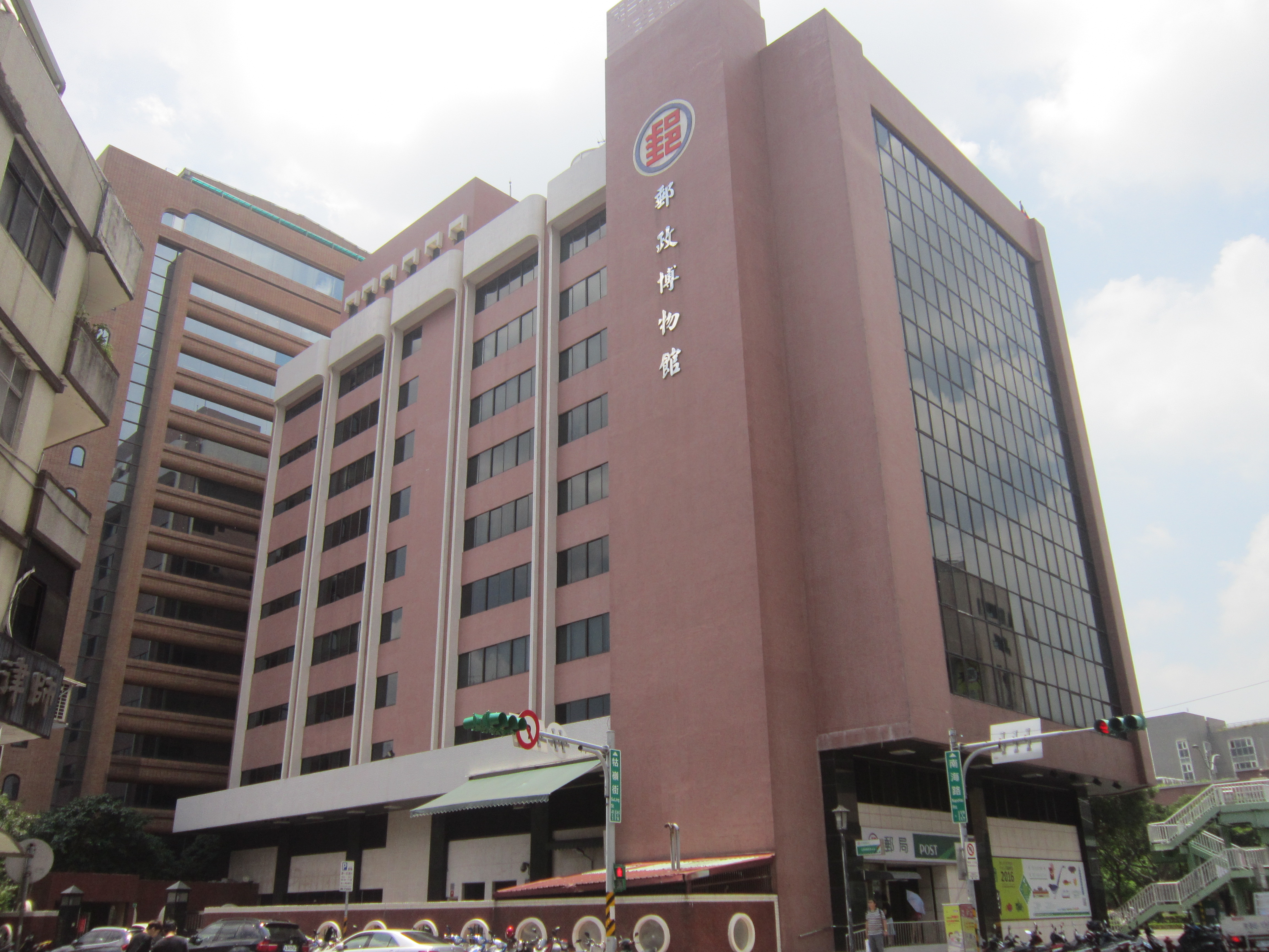 郵政博物館牯嶺街側面一景。